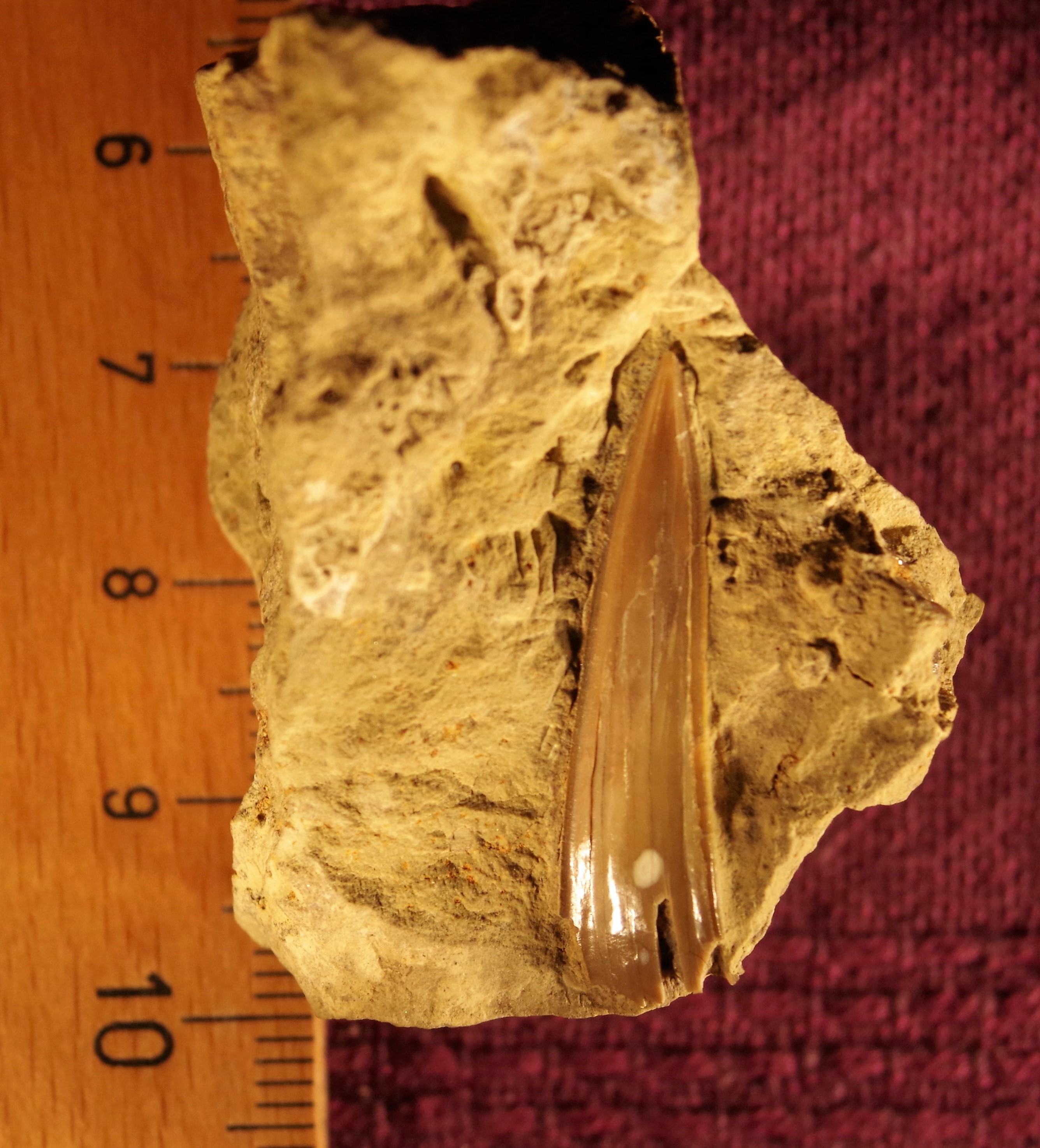 Fossiler Haifischzahn, (Lamna), Mittlerer Jura, Bajocium, Klettgau